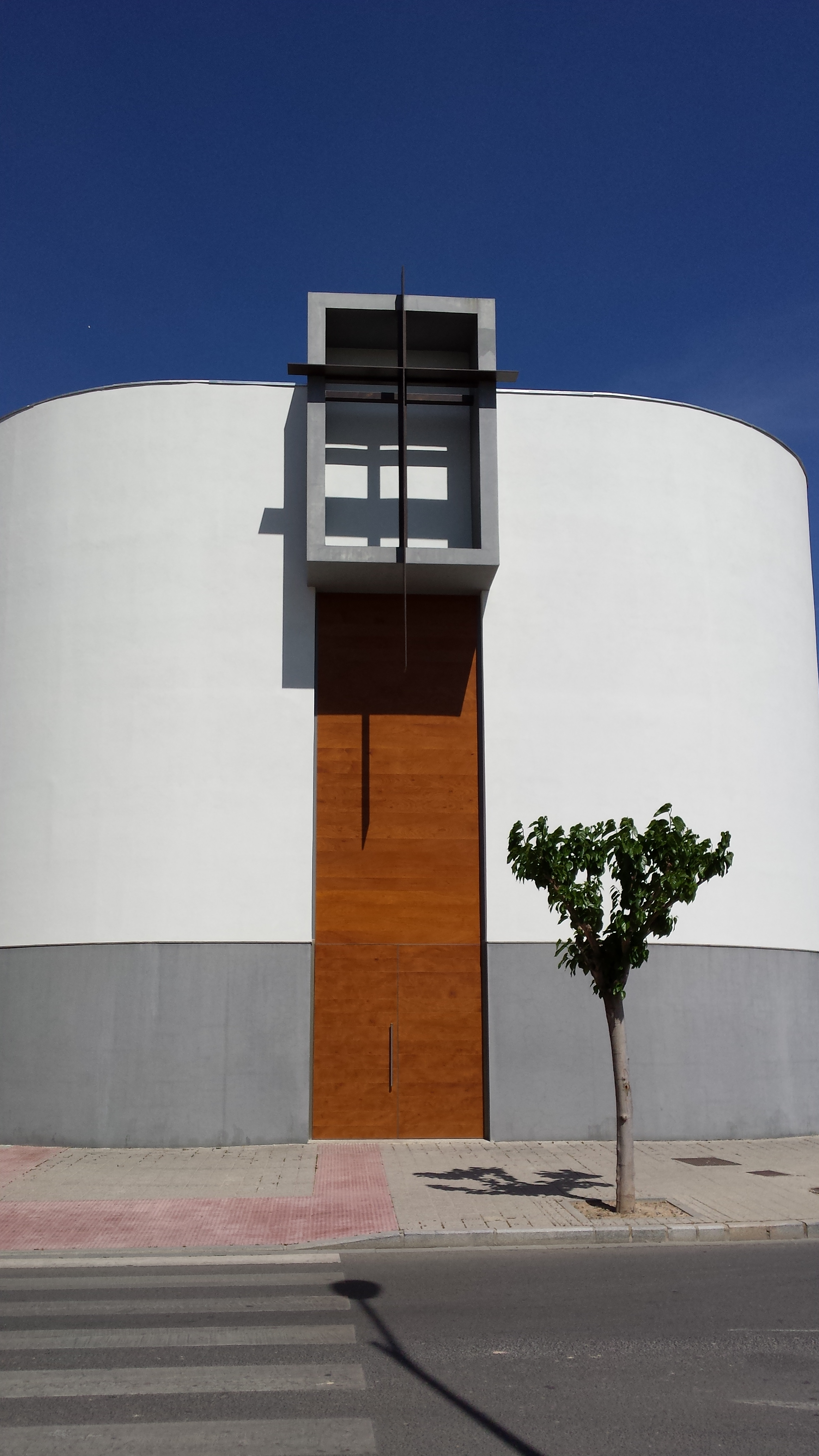 Parroquia de Santo Domingo de Guzmán. Barrio Hermanos Falcó. Las Quinientas (Las 500). Albacete